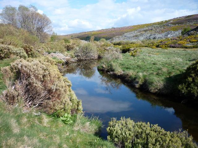 Panorámica del rio Truchas cerca de su nacimiento.